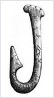 amu historia1